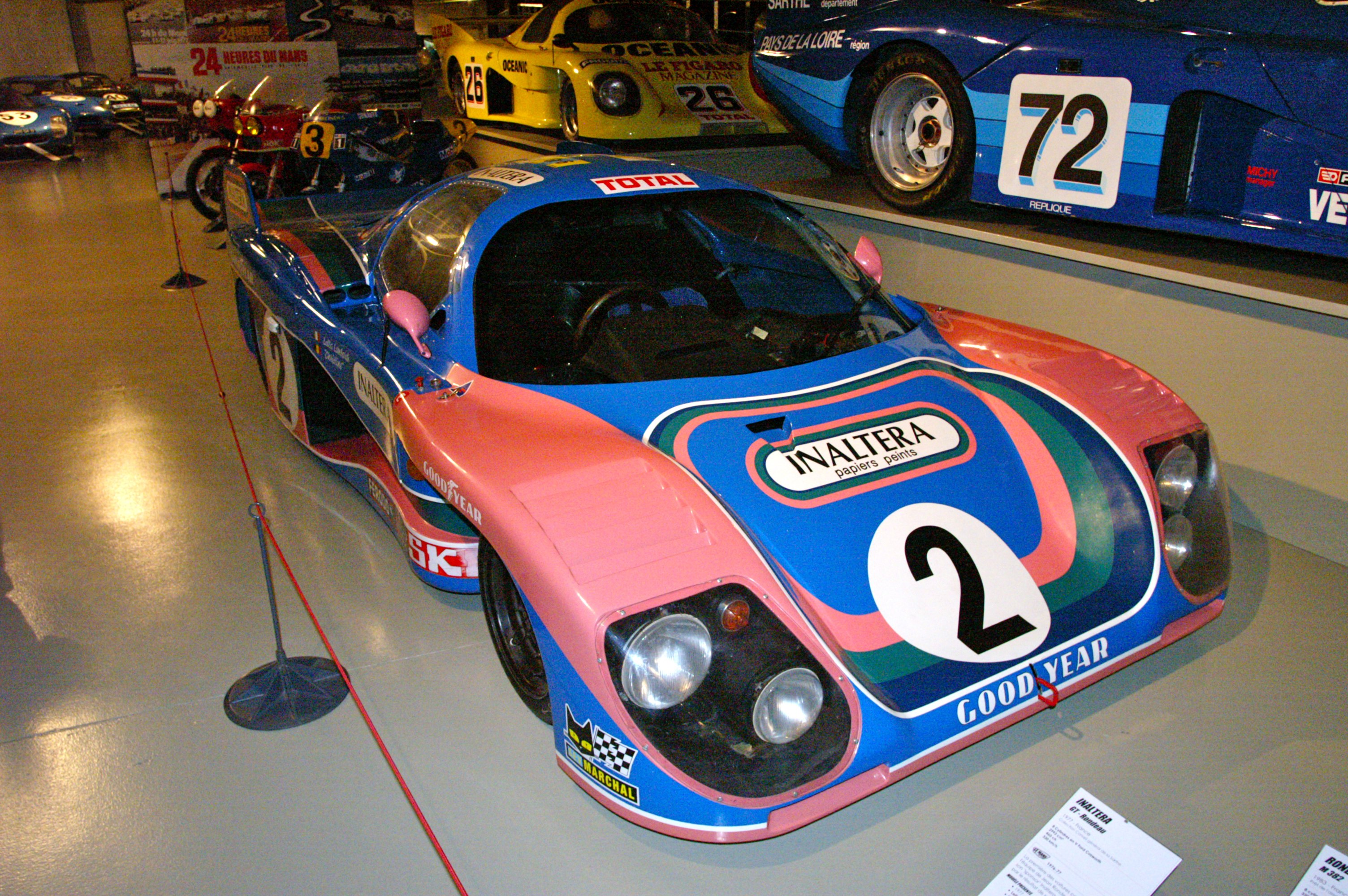 Le Musee des 24 Heures